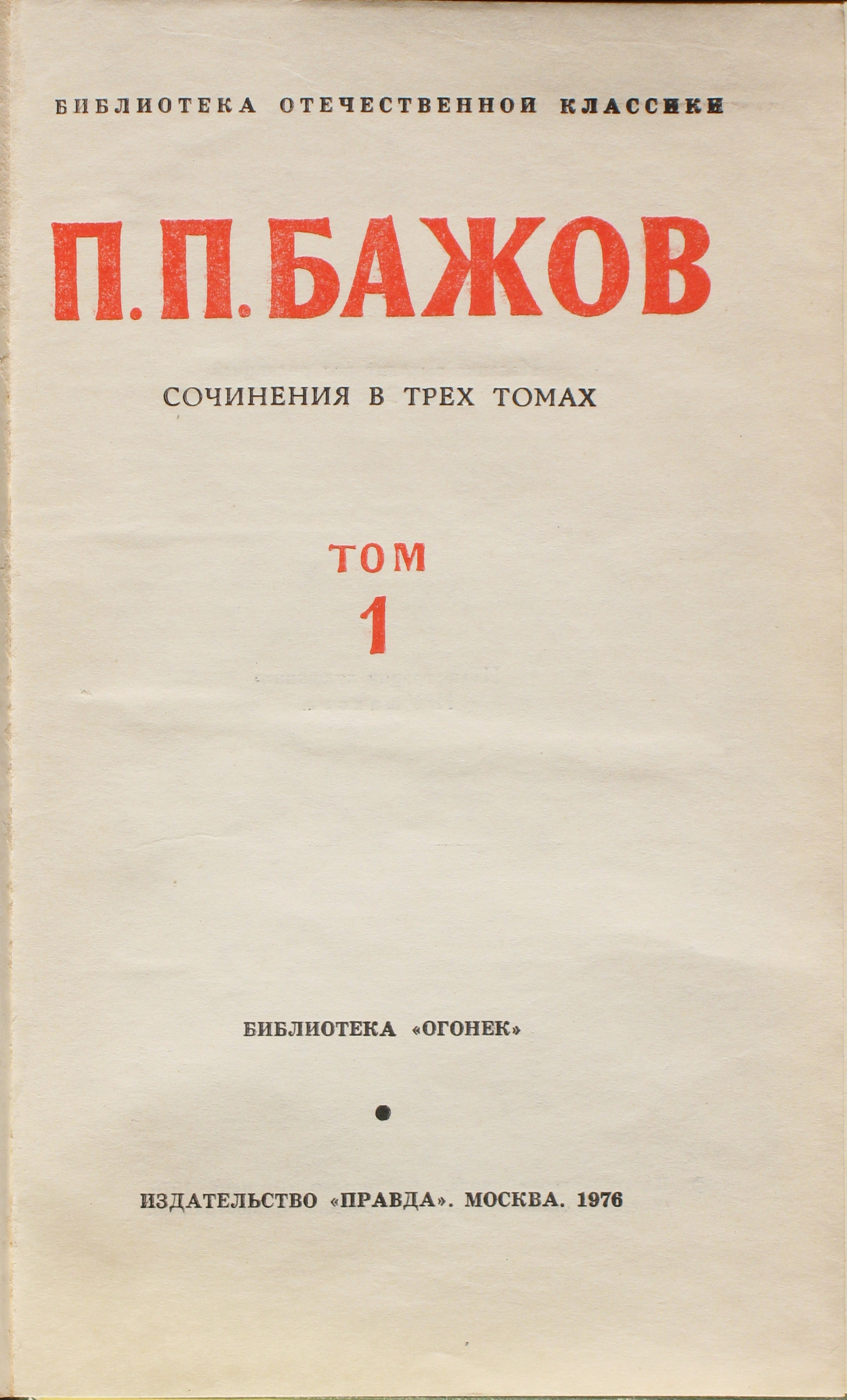 Павел Бажов. Сочинения в трёх томах. Библиотека "Огонёк", Библиотека отечественной классики. Титульный лист 1-го тома.